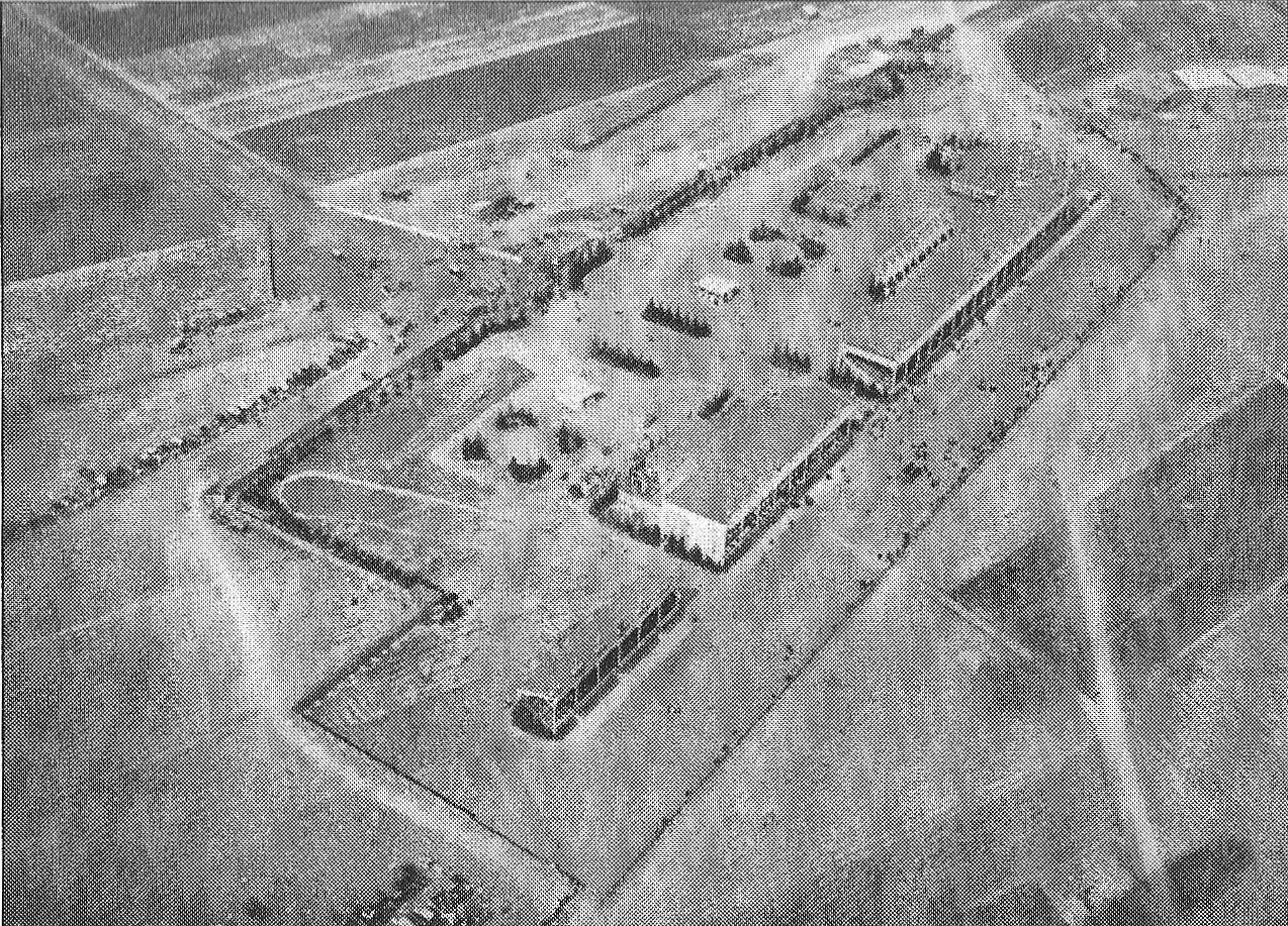 In L'Illustration, les tribunes de Betheny.